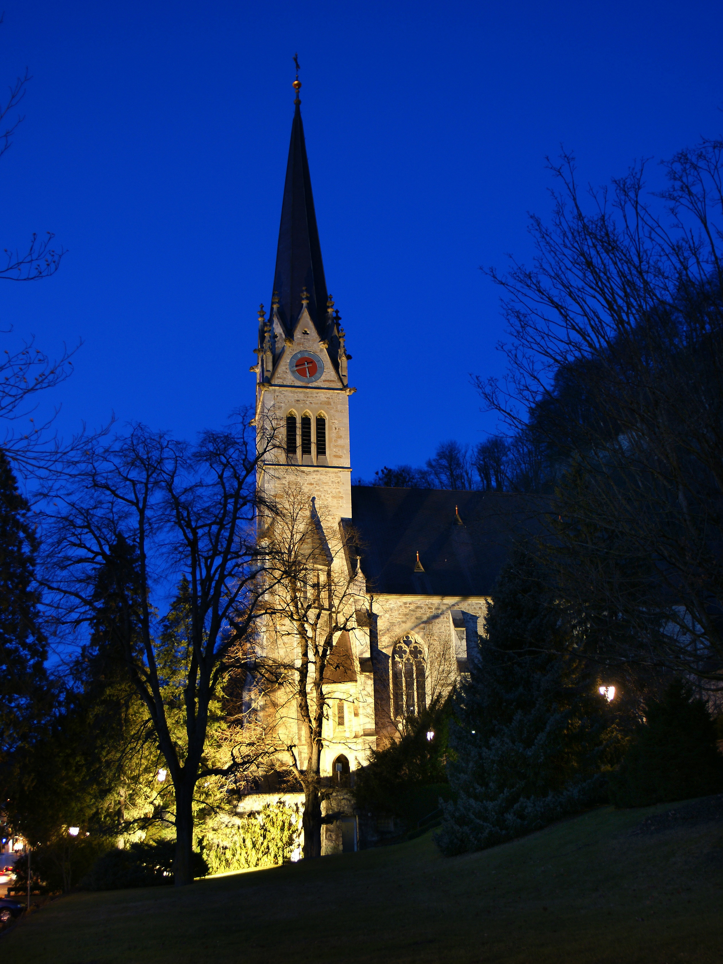 Die Kathedrale St. Florin ist eine neugotische dreischiffige Kirche in Vaduz, Liechtenstein, die 1873 nach den Plänen von Friedrich von Schmidt errichtet wurde.